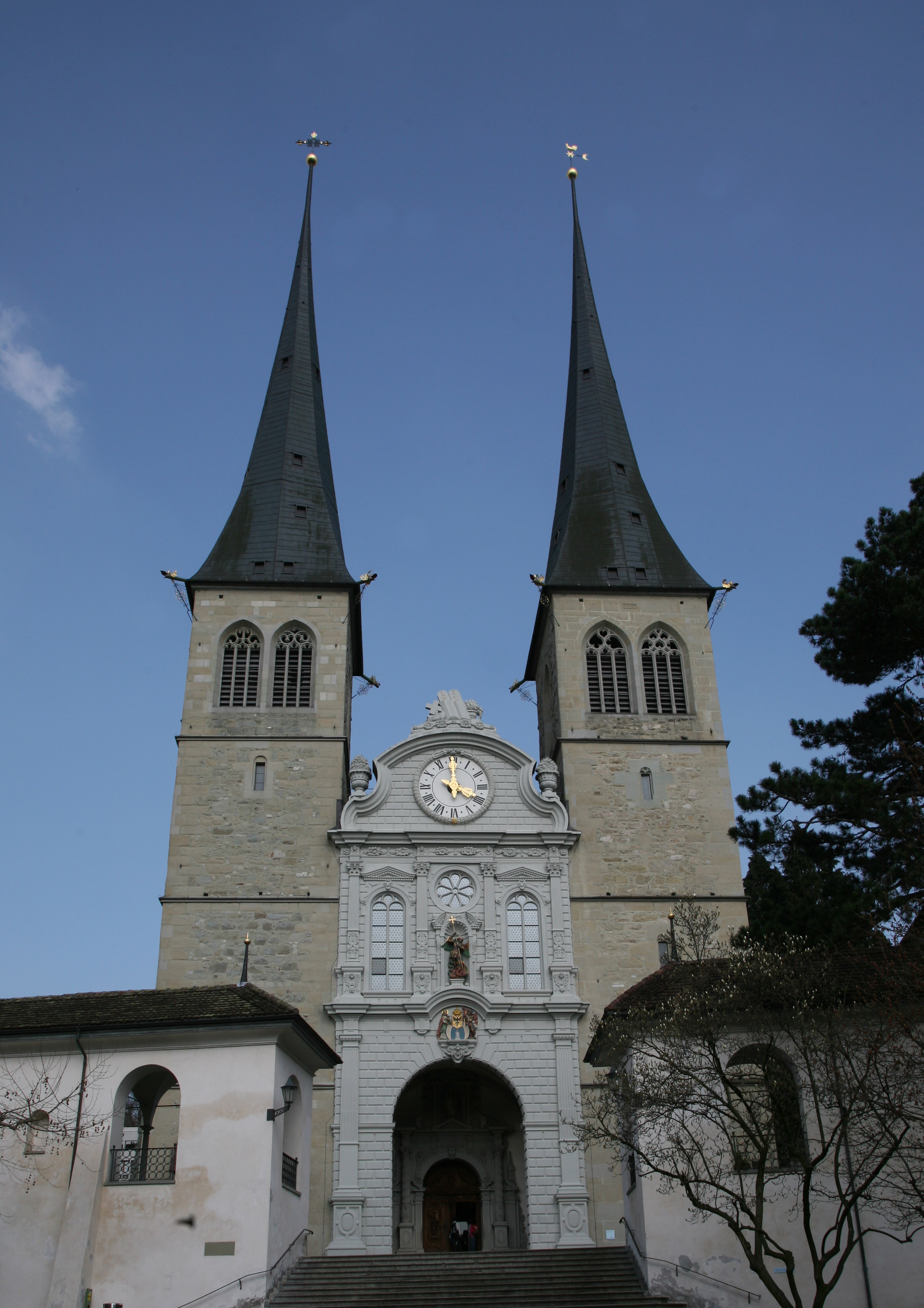 Aussenansicht Hofkirche